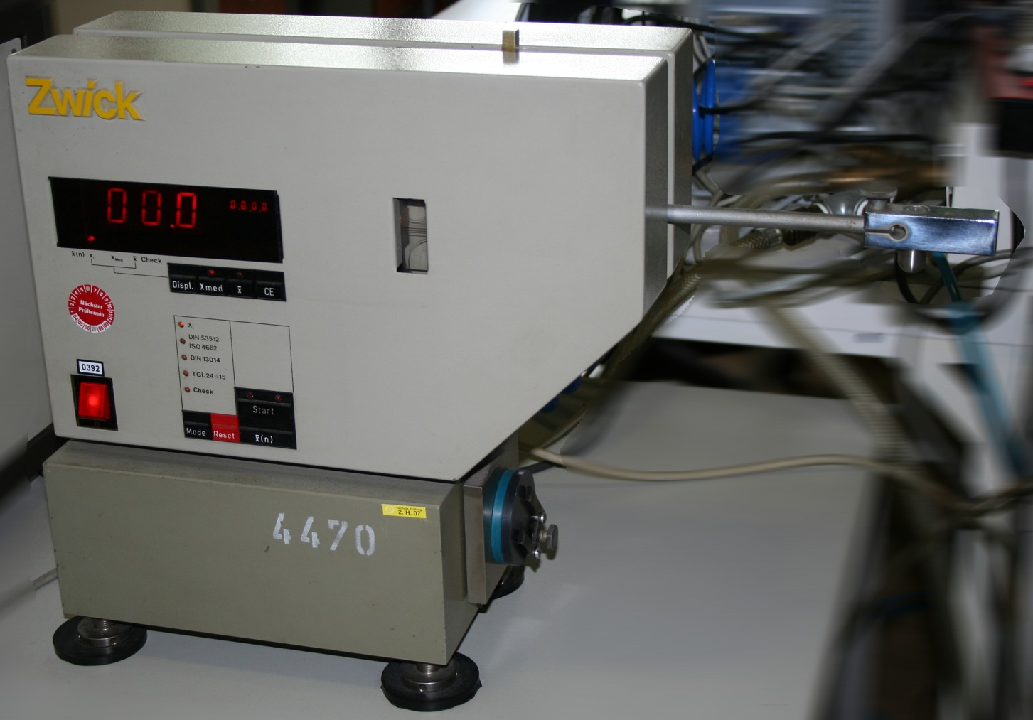 Rückprall-Messgerät